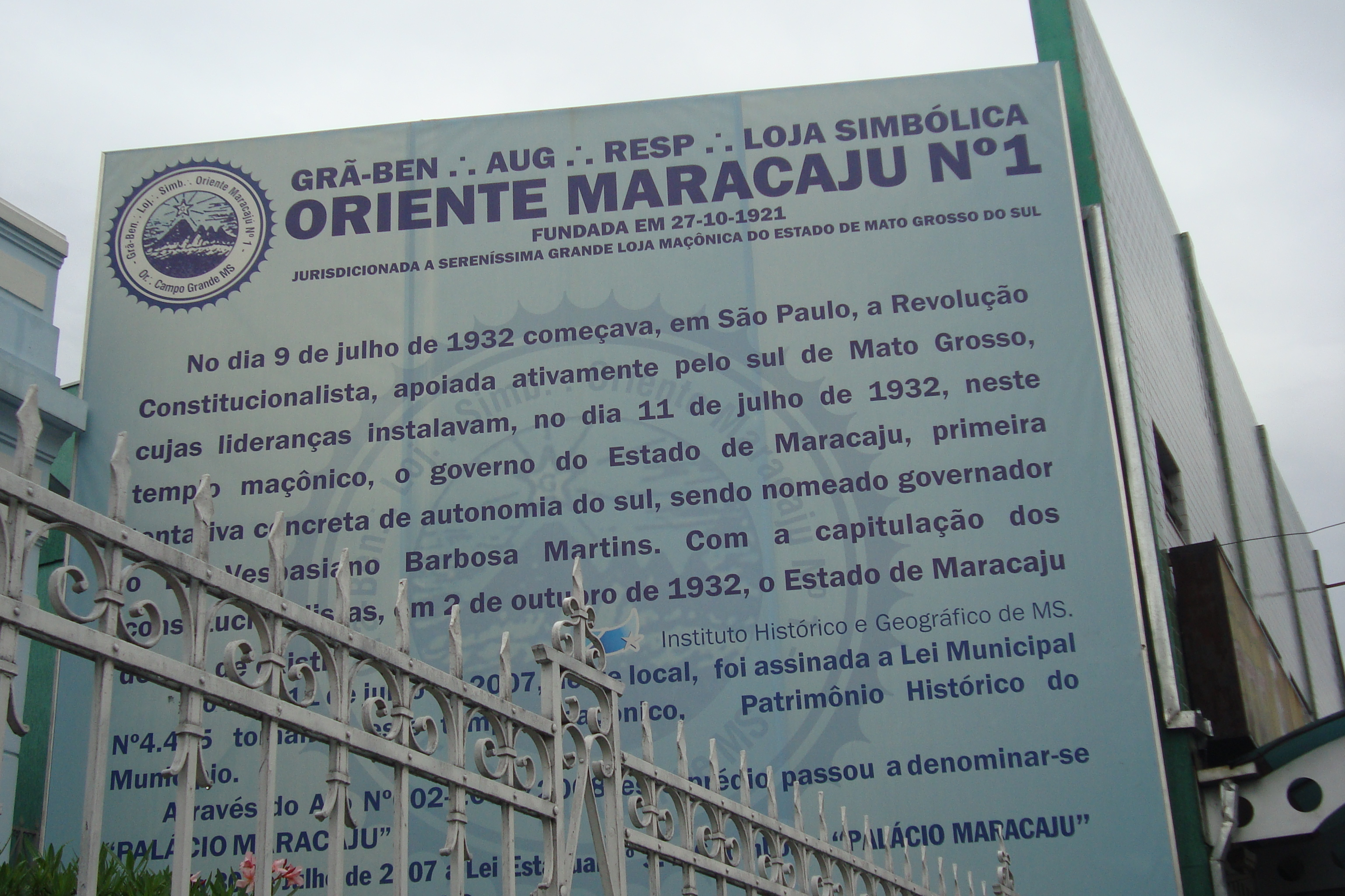 Palácio Maracaju, sede do Estado de Maracaju durante a Revolução Constitucionalista de 1932, localizado em Campo Grande, MS, Brasil